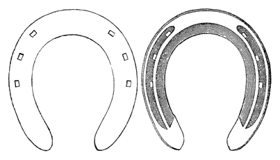 Wiener Hufeisen. [links] von oben / von der Huffläche [rechts] von unten / von der Bodenfläche